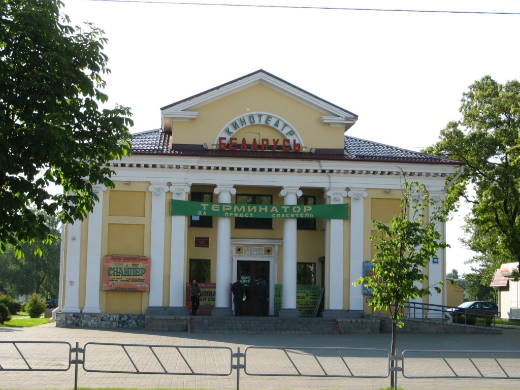 Streets (Slutsk, Belarus)